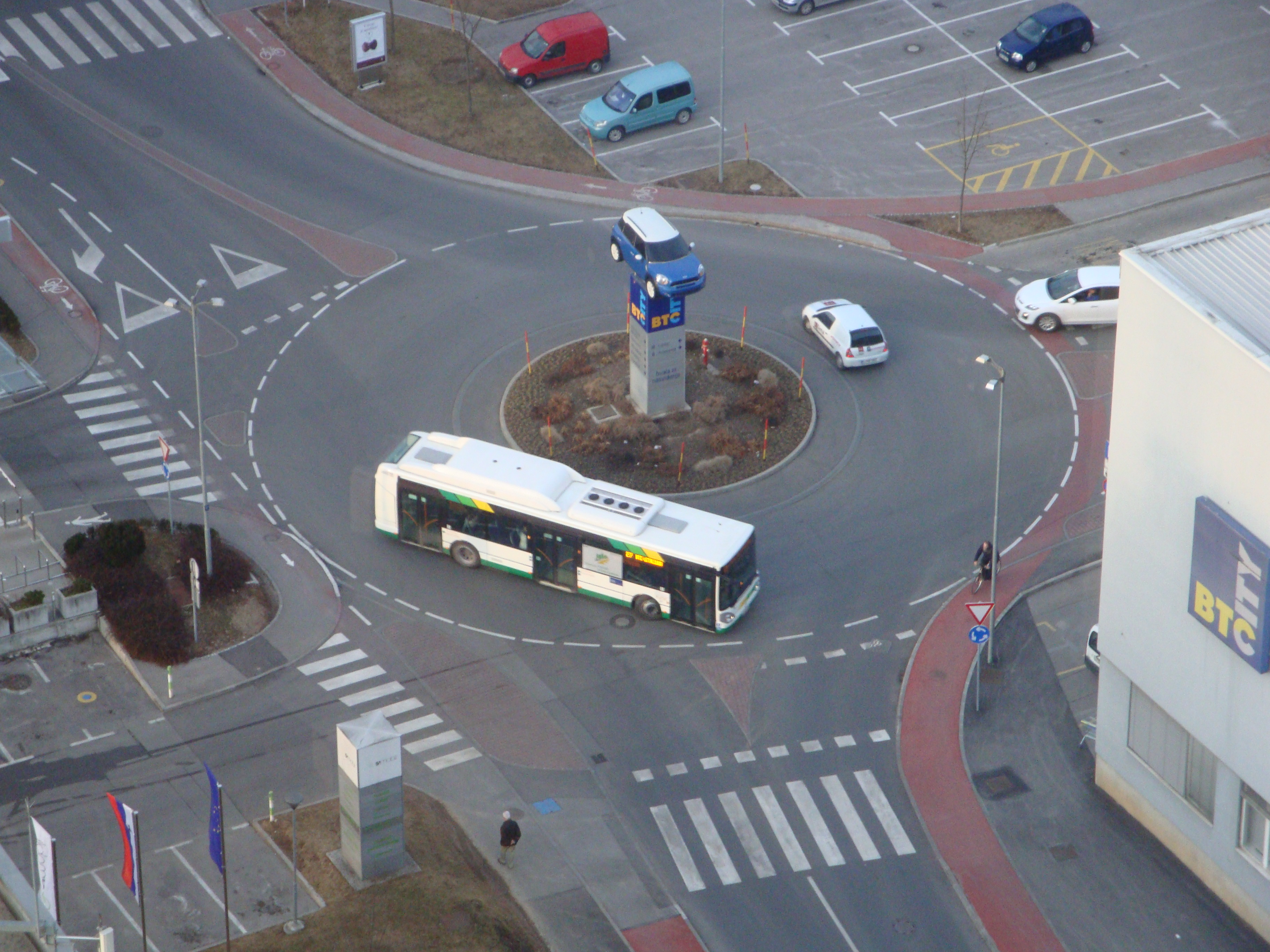 krožišče v BTC (pogled s Kristalne palače), Ljubljana, Slovenija